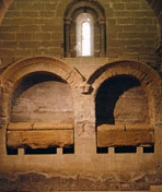 Aragonés: Sepoltura de Pero II d'Aragón en o Reyal Monesterio de Santa María de Sixena